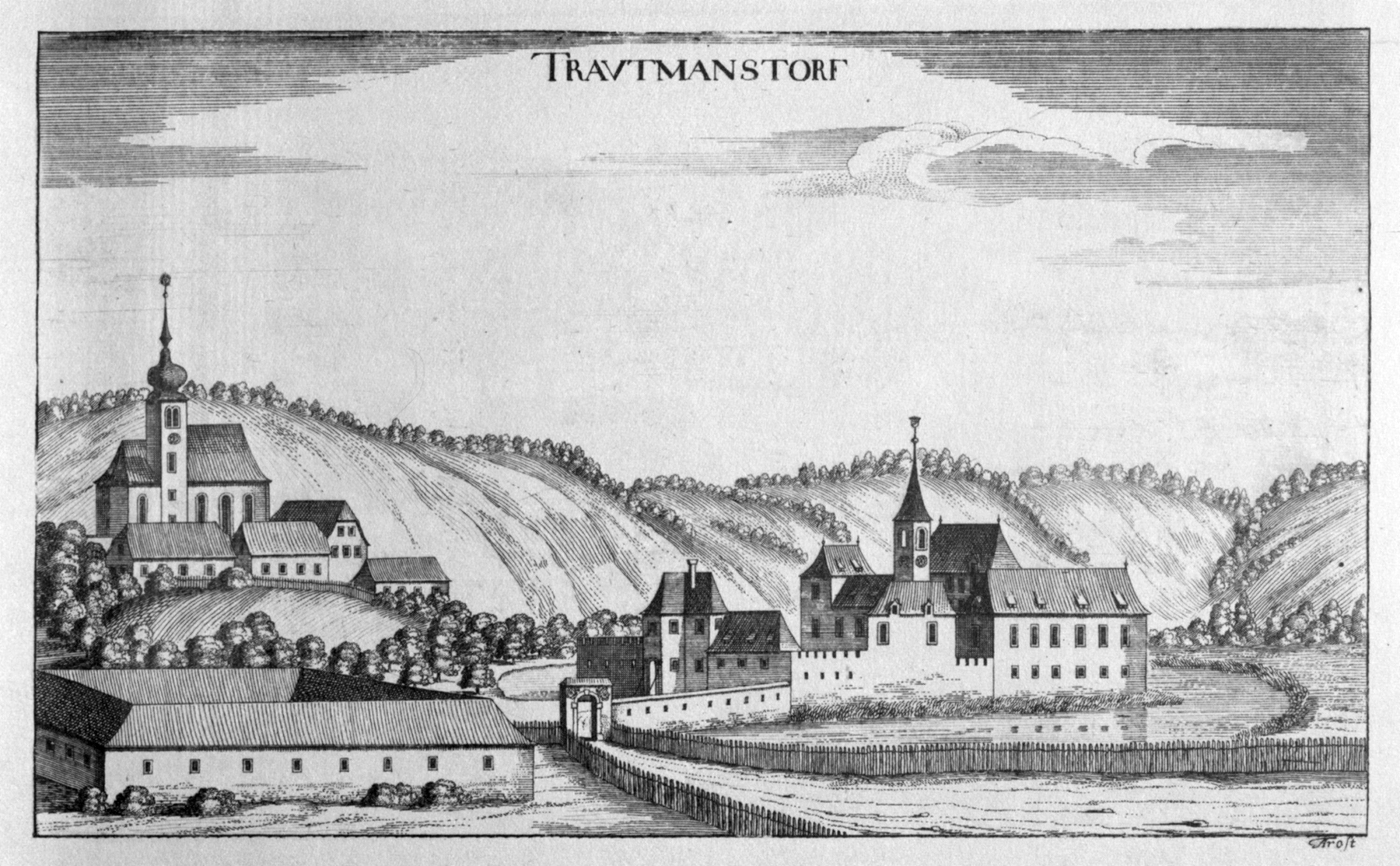 G. M. Vischers Käyserlichen Geographi, Topographia Ducatus Stiriae, Das ist: Eigentliche Delineation / und Abbildung aller Städte / Schlösser / Marcktfleck / Lustgärten / Probsteyen / Stiffter / Clöster und Kirchen / so es sich im Herzogthumb Steyrmarck befinden; Und anjetzo Umb einen billichen Preyß zu finden seynd Bey Johann Bitsch Universitäts Buchhandlern / Auff dem Juden=Platz bey der guldenen Saulen. Graz 1681 Die Nummerierung der Dateien folgt der alphabetischen Reihung der Ortsnamen und entspricht nicht dem Vischer-Register